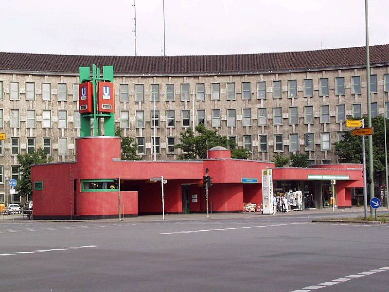 U-Bahn Berlin, Bahnhof Fehrbelliner Platz (Linien U3 and U7)